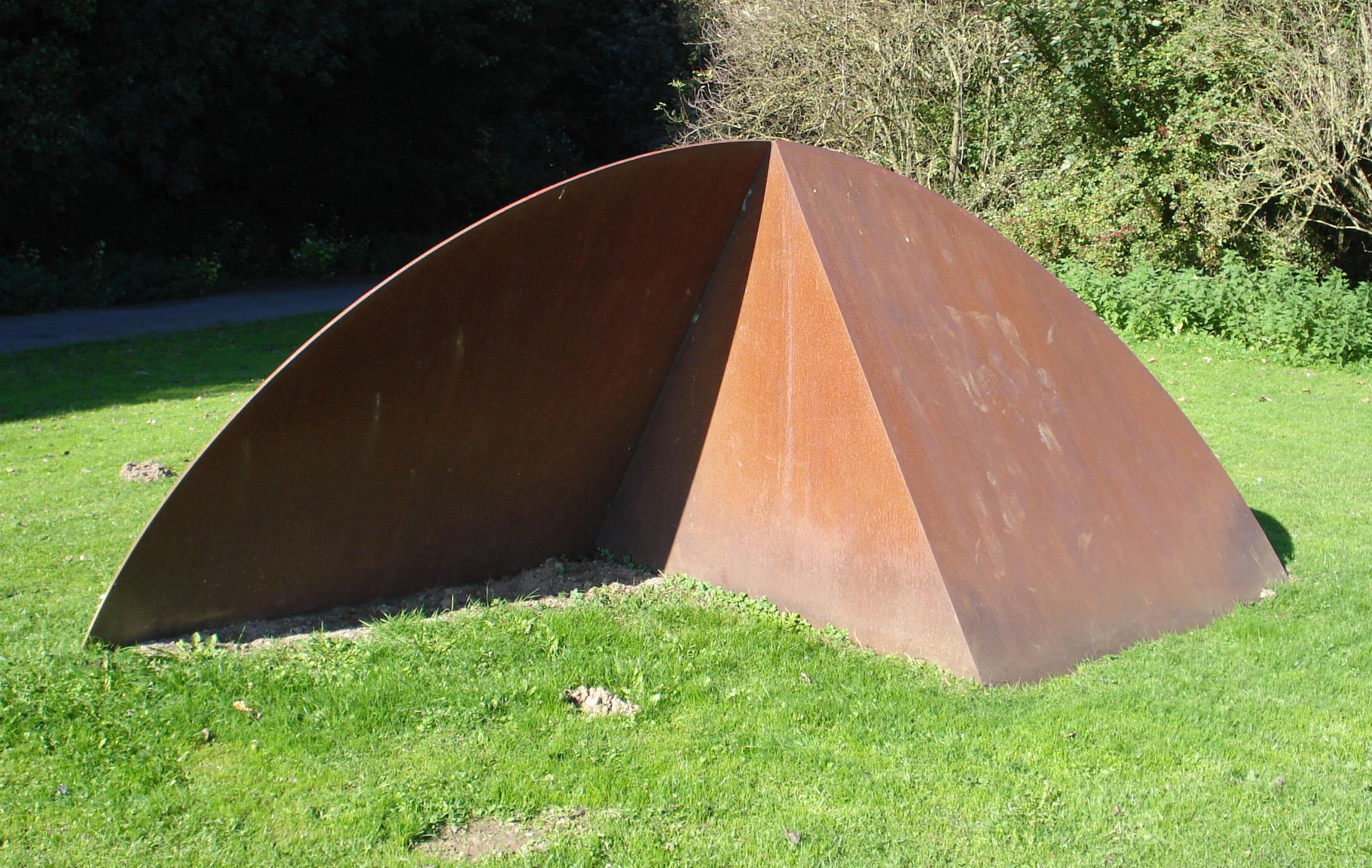 Beeldenpark Zwijndrecht. Kunstwerk "Gothic II" van Lucien den Arend. Zwijndrecht/The Netherlands. FOP.